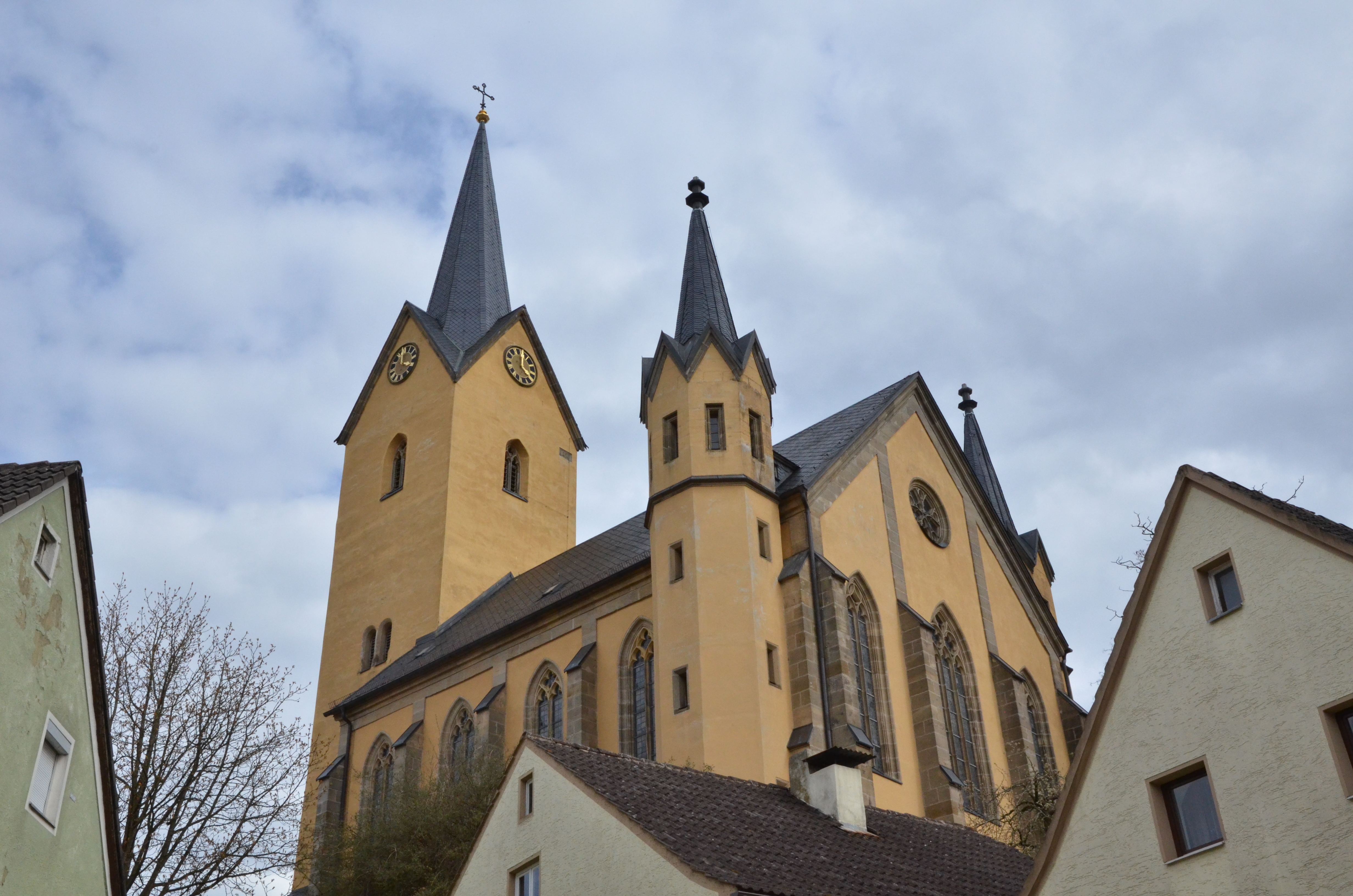 evang.-luth. Kirche St. Lucia und Ottilie in Hechlingen